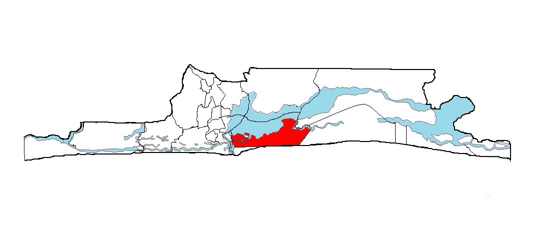 Ubicación de Eti Osa en el Estado de Lagos